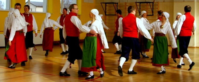 II ülevaatusel tantsimas.